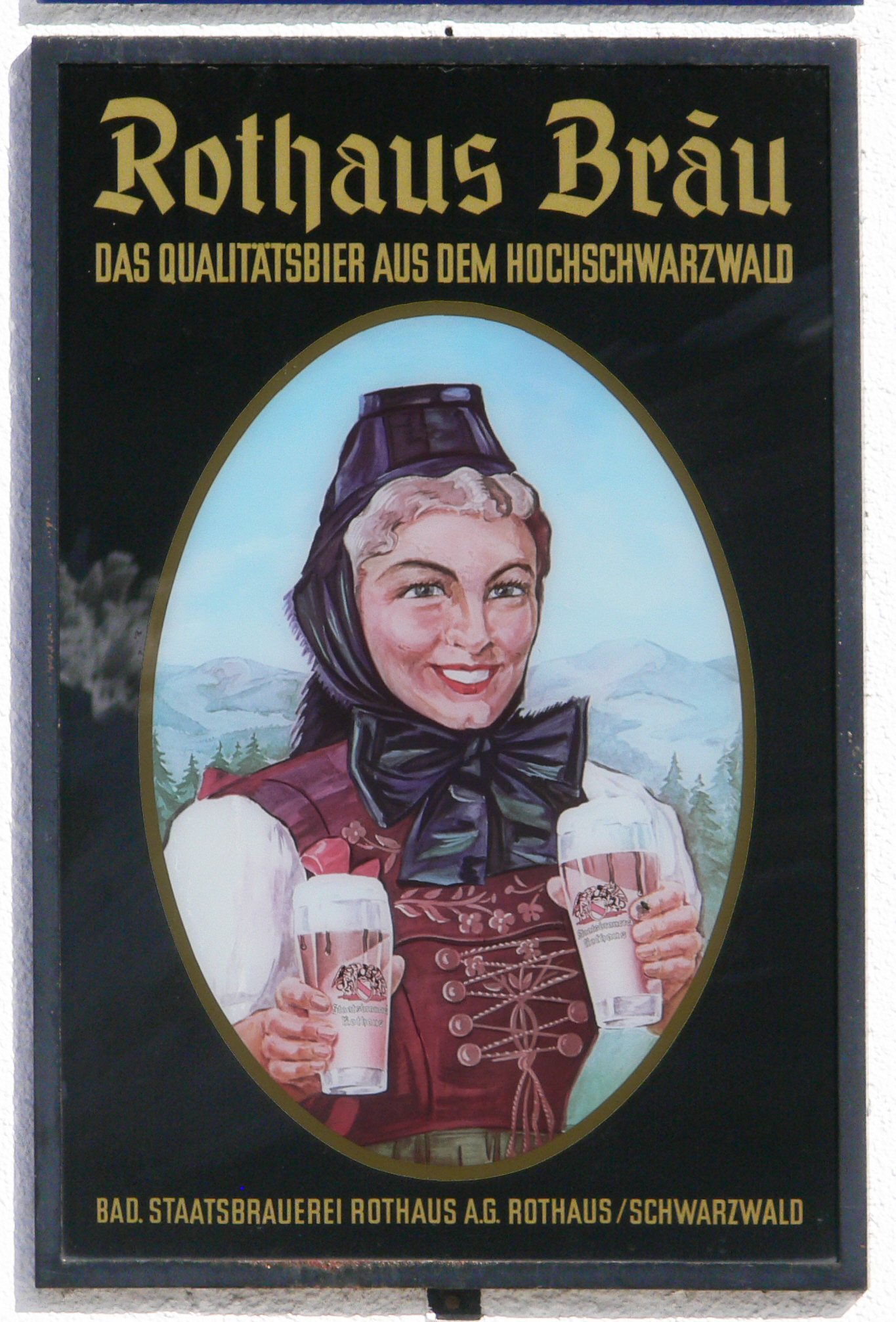 Nostalgisches (dauerhaft angebrachtes) Rothaus-Werbeschild an einem Wirtshaus in Neustadt (Titisee-Neustadt)